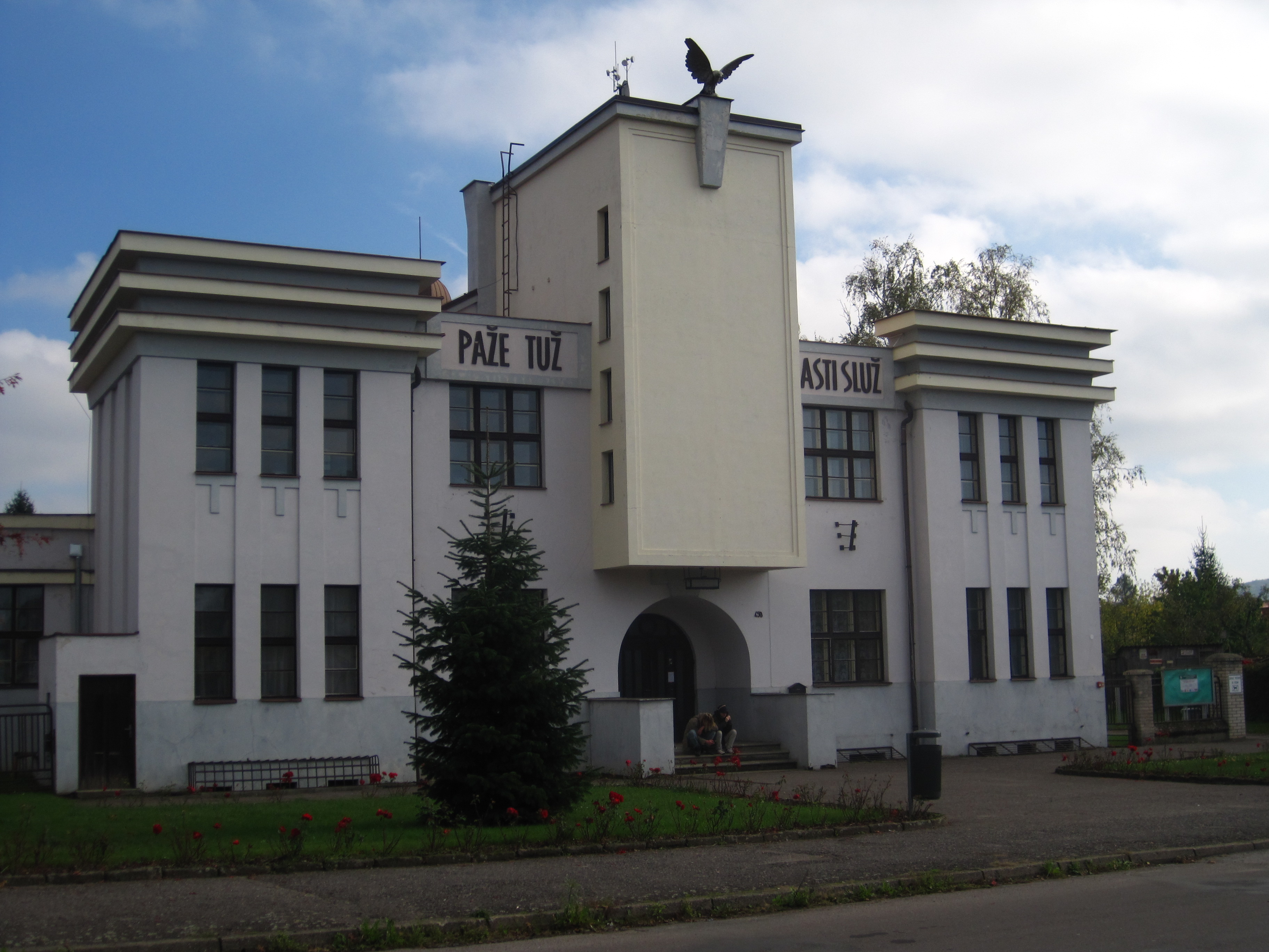 Bakov nad Jizerou - sokolovna v Boleslavské ulici